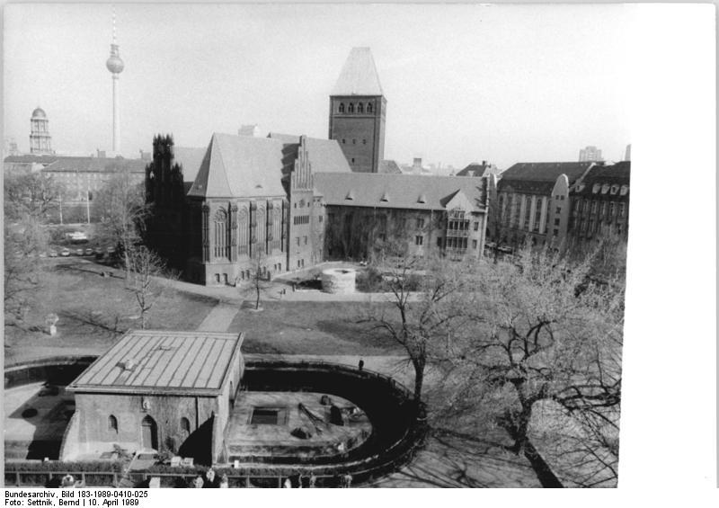 Berlin, Köllnischer Park, Bärenzwinger ADN-ZB Settnik 10.4.89 Berlin: Köllnischer Park - Blick auf das Ensemble Am Köllnischen Park: (l).: der Bärenzwinger - der Bär ist das Berliner Wappentier aus den 30er Jahren. (M): Märkisches Museum. Dieser historische Gebäudekomplex, dessen einzelne Teile sich an Bauten der Backsteingotik und der Renaissance anlehnen, wurde Anfang des 20. Jahrhunderts von Ludwig Hoffmann erbaut.